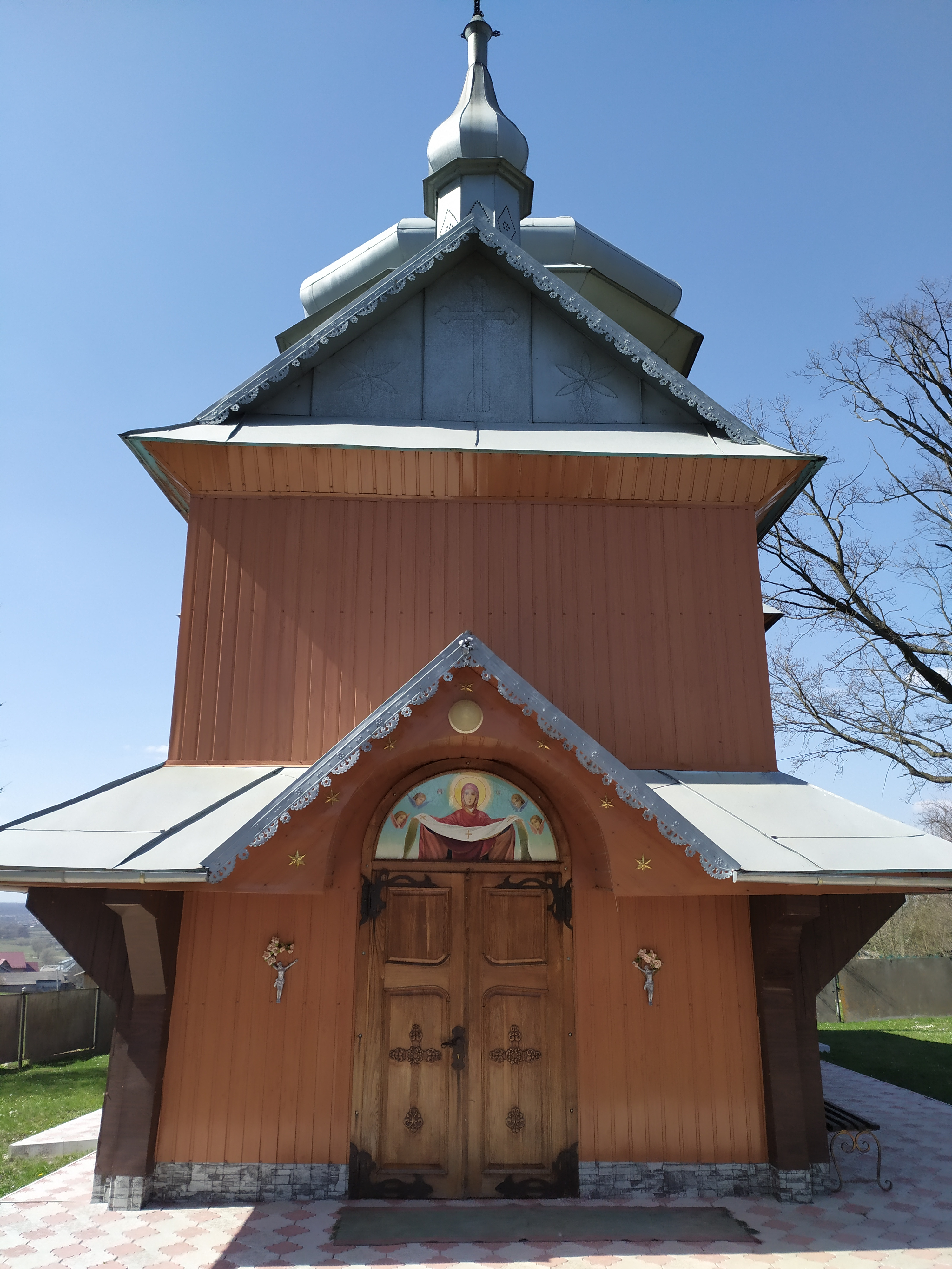 Храм Покрови Пресвятої Богородиці с. Грабич, Православна Церква України.